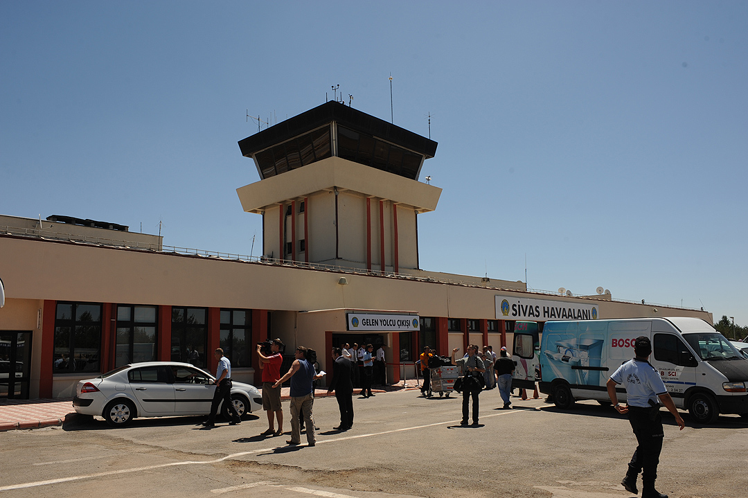 SIVAS AIRPORT, Turkey